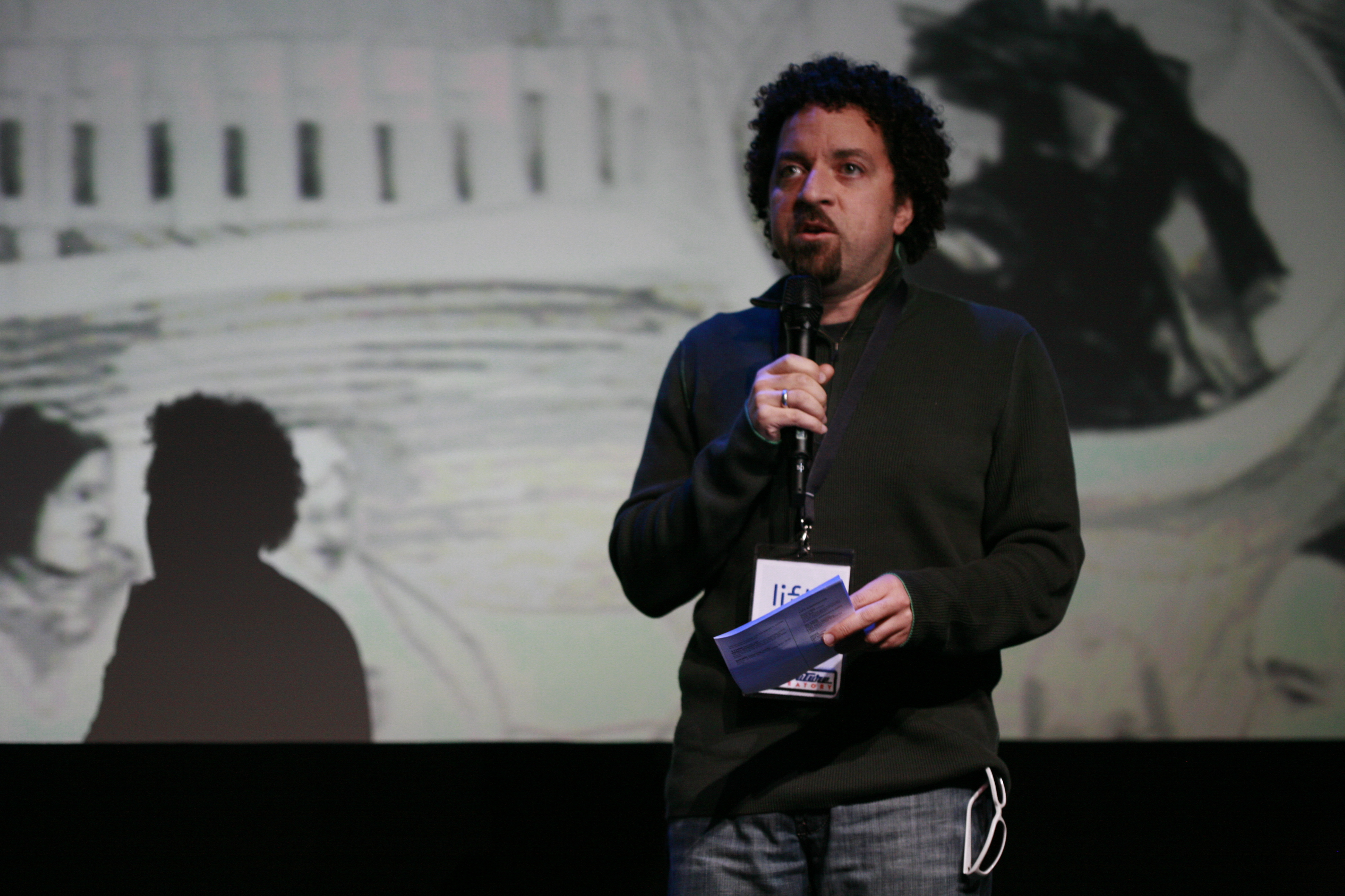 Julian Bleecker